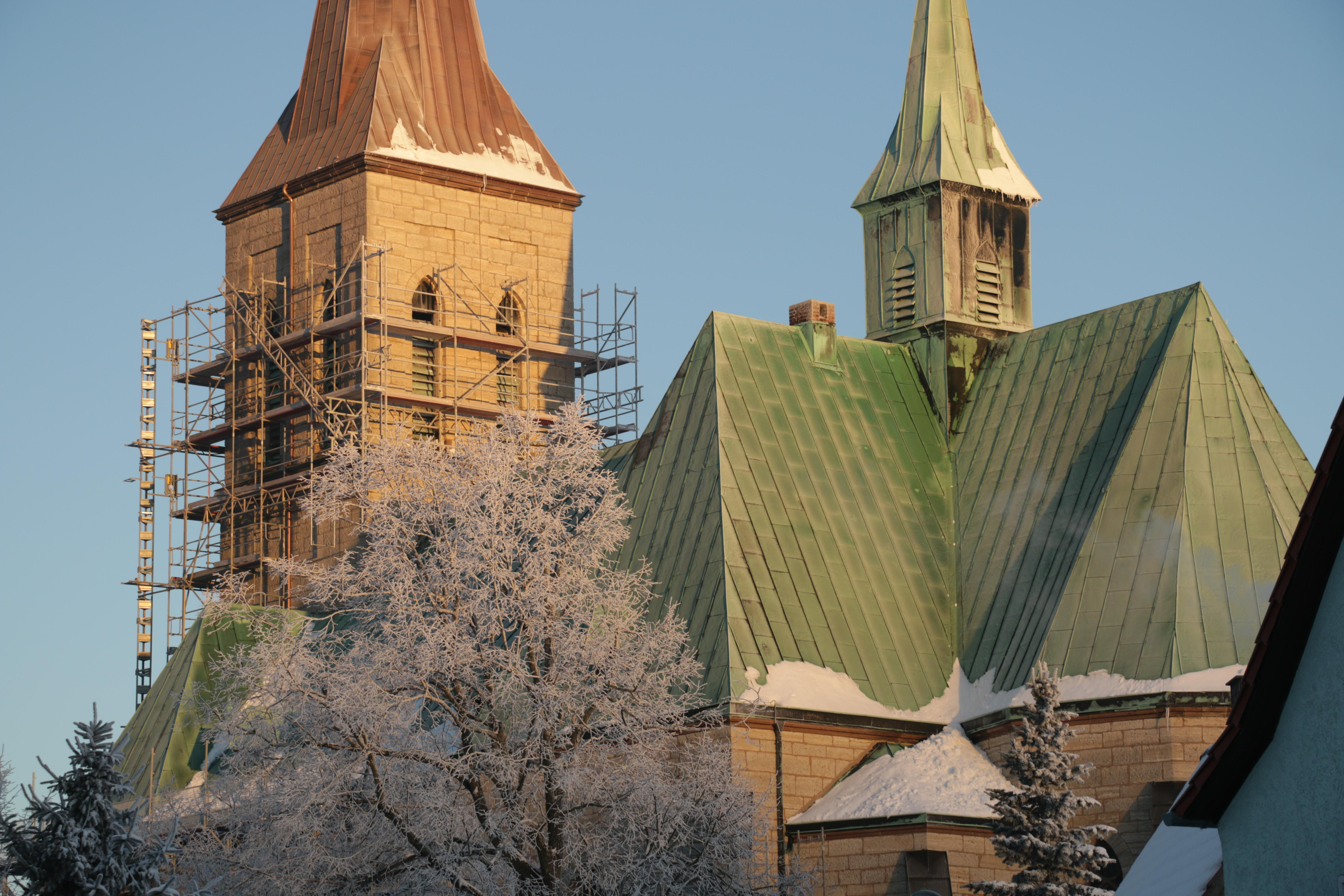 Eichsfelder Dom Sankt Alban in Effelder (Eichsfeld) im Morgenlicht.